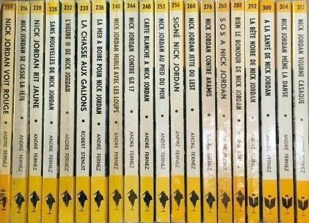 Nick Jordan 1 (Pocket Marabout).